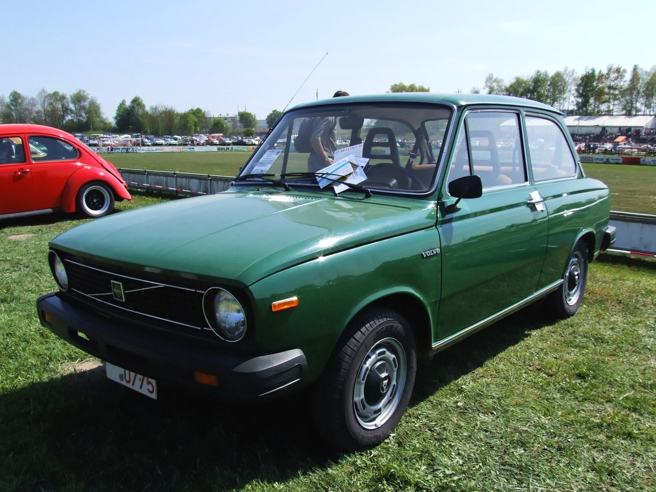 Quelle: selbst fotografiert, 04/2007 Fotograf: Späth Chr.